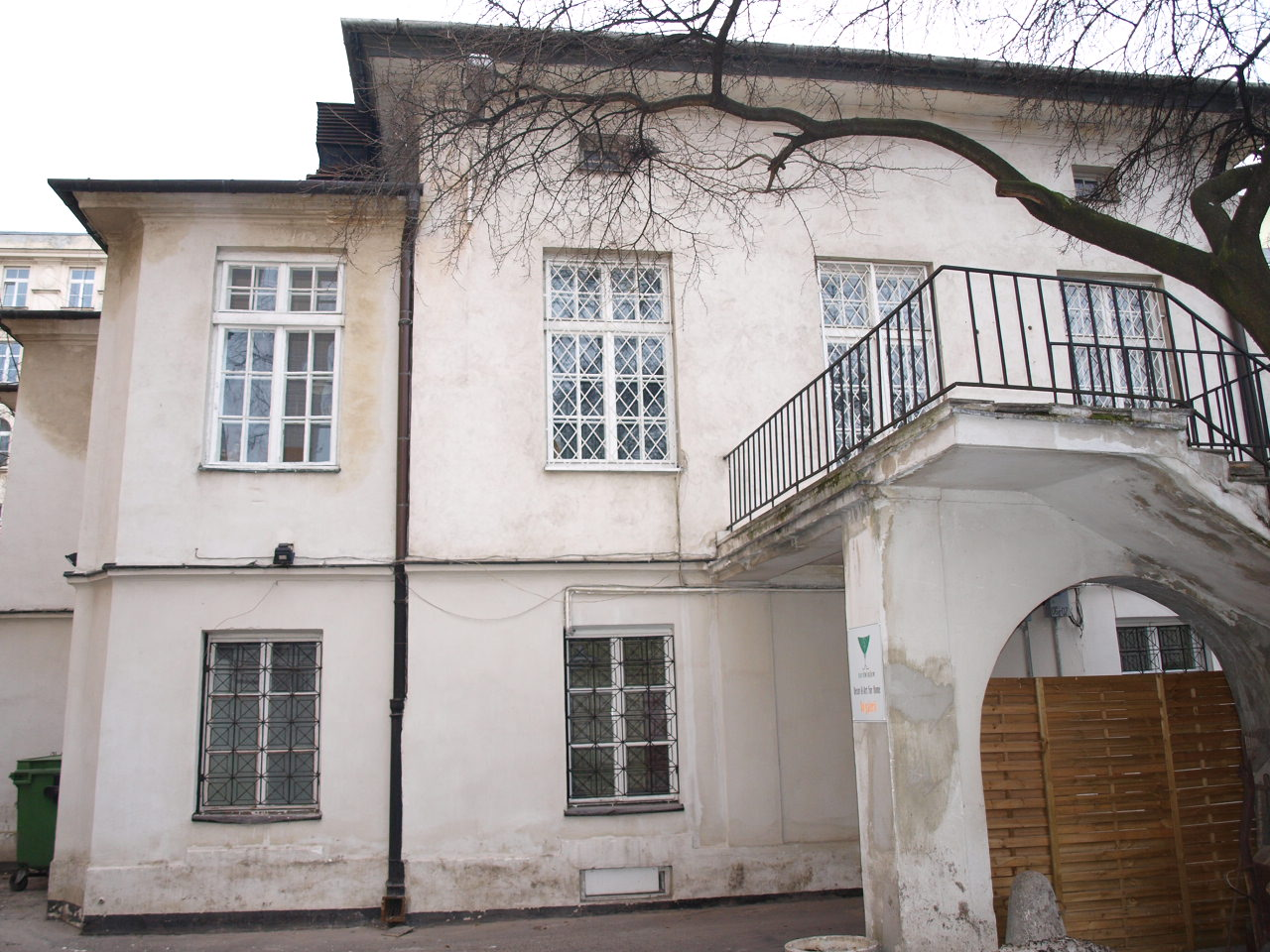 dom Kraszewskiego przy ulicy Mokotowskiej 48 - podwórze